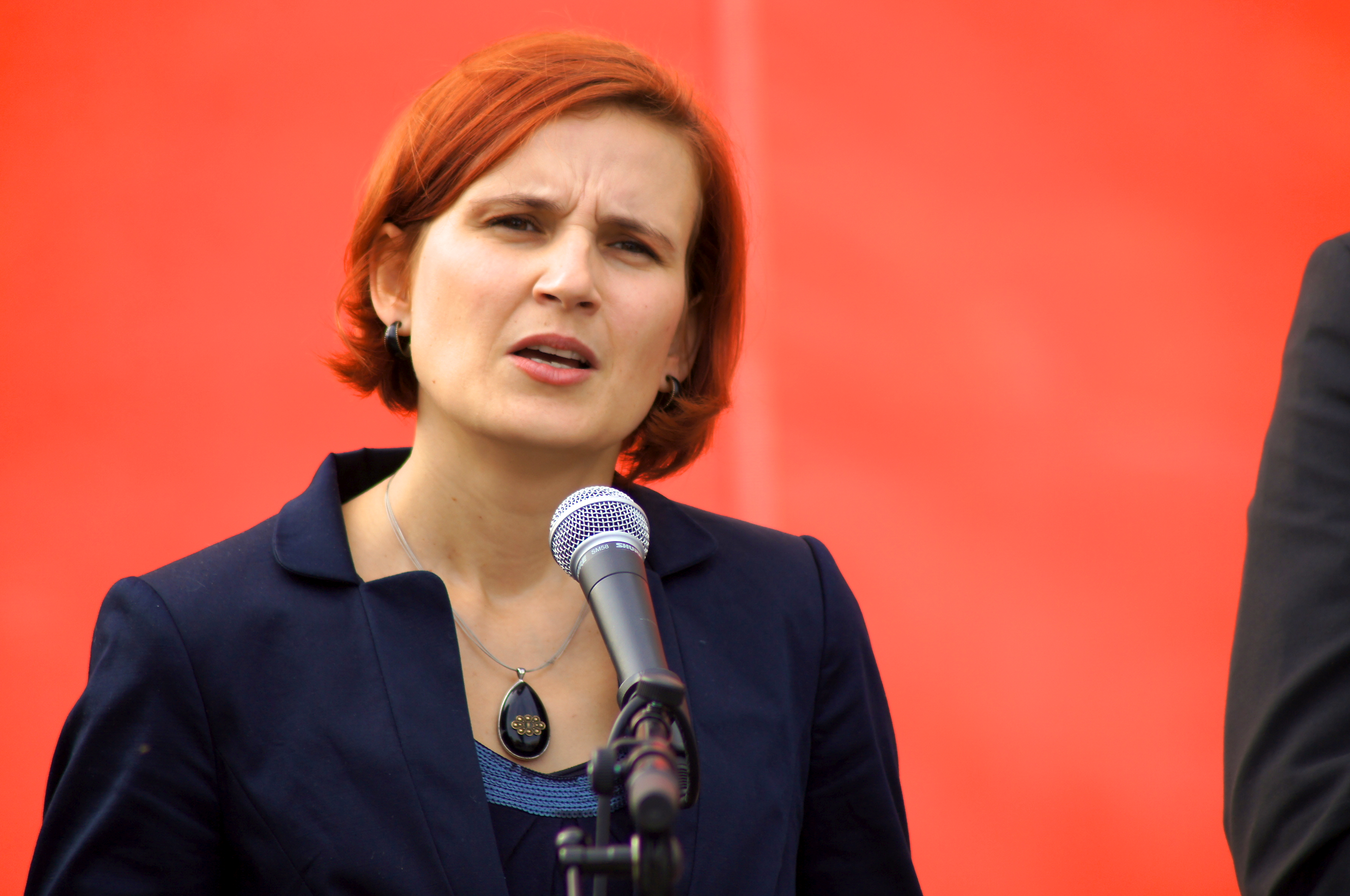 Die Bundesregierung hat bei ihrem Amtsantritt versprochen, die Ostrenten an das Niveau im Westen anzupassen. Passiert ist - wie bei den Vorgängerregierungen auch - nichts. Mit einem 14 Meter langen Transparent rückte DIE LINKE heute vor dem Kanzleramt an, um Angela Merkel an ihr Versprechen zu erinnern: »Frau Bundeskanzlerin, halten Sie Wort! Altersarmut stoppen! Ostrenten anpassen!«.